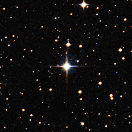 Imagen de la estrella HIP 102152